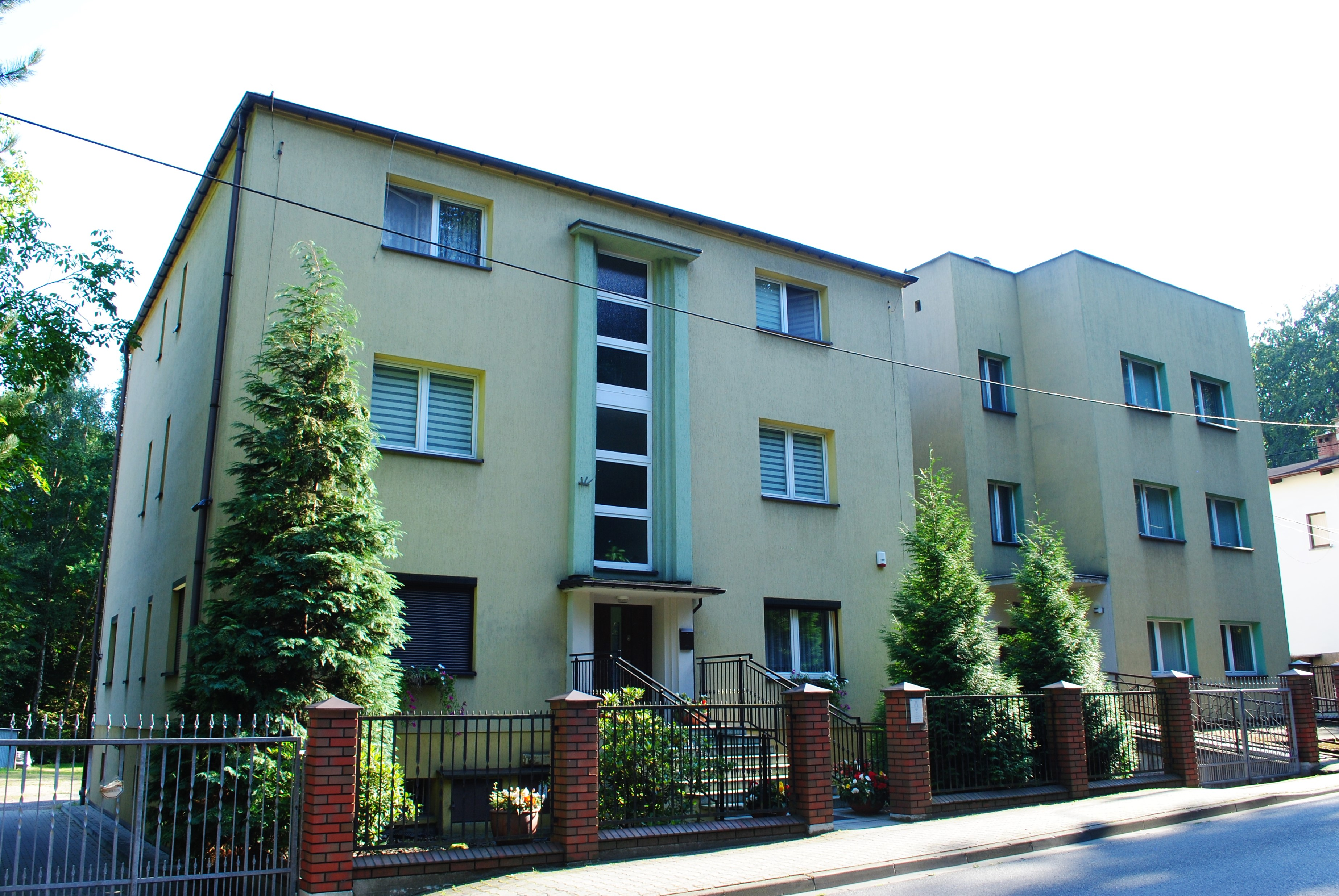 Katowice-Giszowiec. Probostwo parafii św. Stanisława Kostki